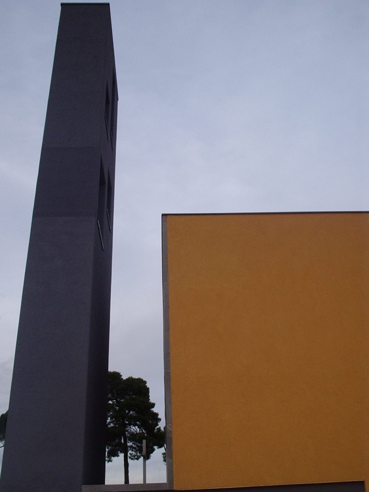 Santa Maria delle Grazie a Casal Boccone, Roma